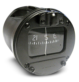 Magnetic compass.